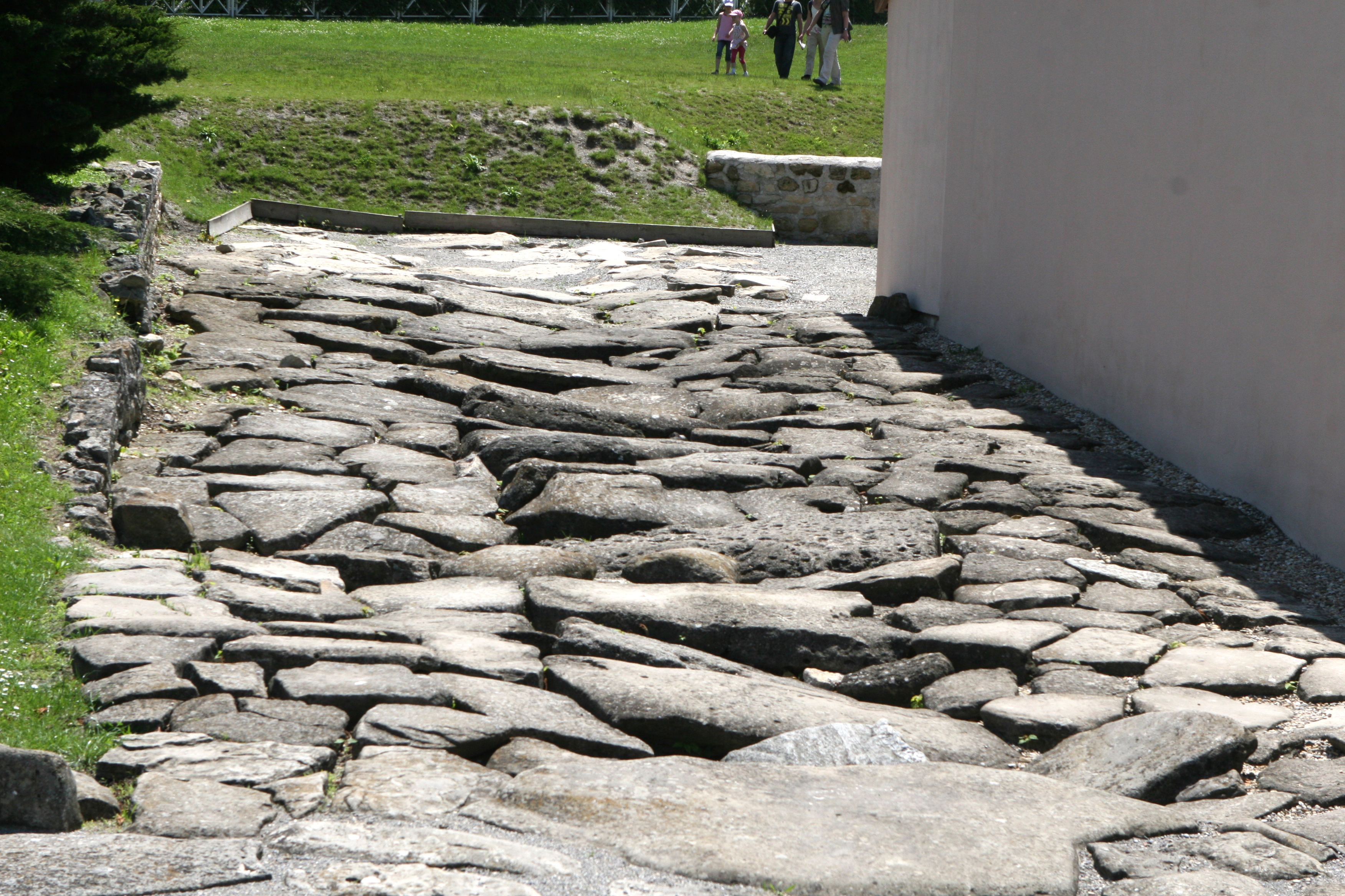 ART CARNUNTUM Dieses Bild wurde anlässlich des österreichischen Tags des Denkmals 2012 in Niederösterreich eingereicht.